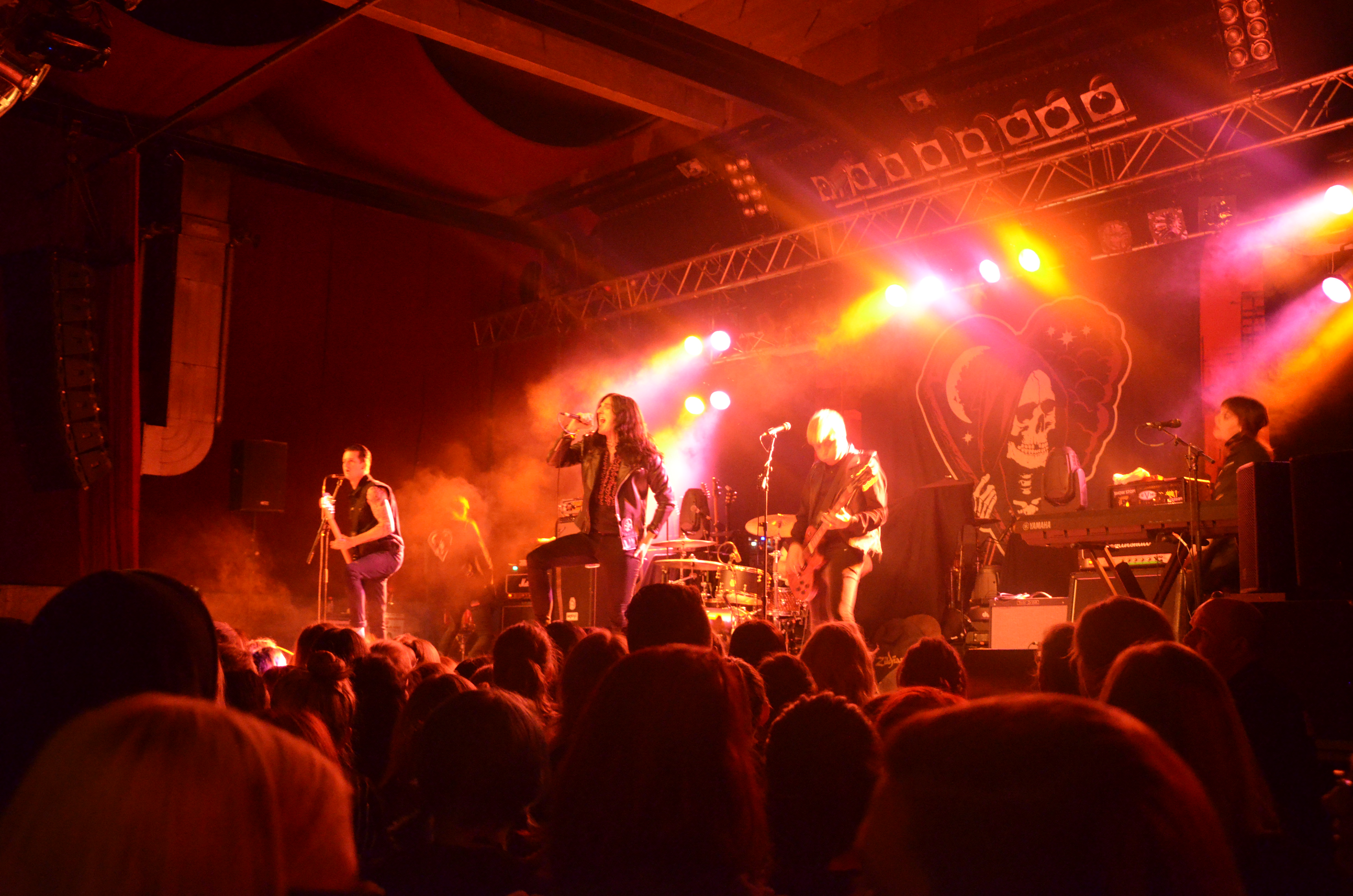 Creeper spielen in der Live Music Hall in Köln, 2016.